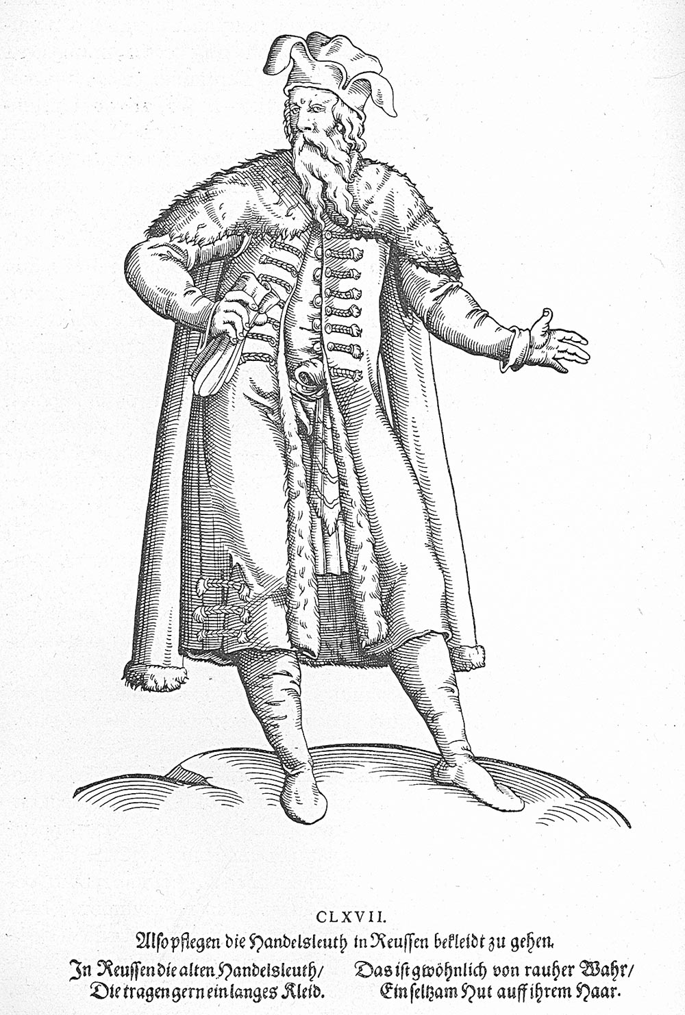 Рускі купец. З вельмі рэдкай нямецкай гравюры 16 стагоддзя, са збору П. Я. Дашкава